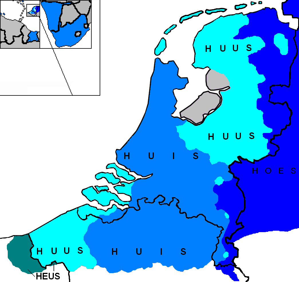 Eigen kaart